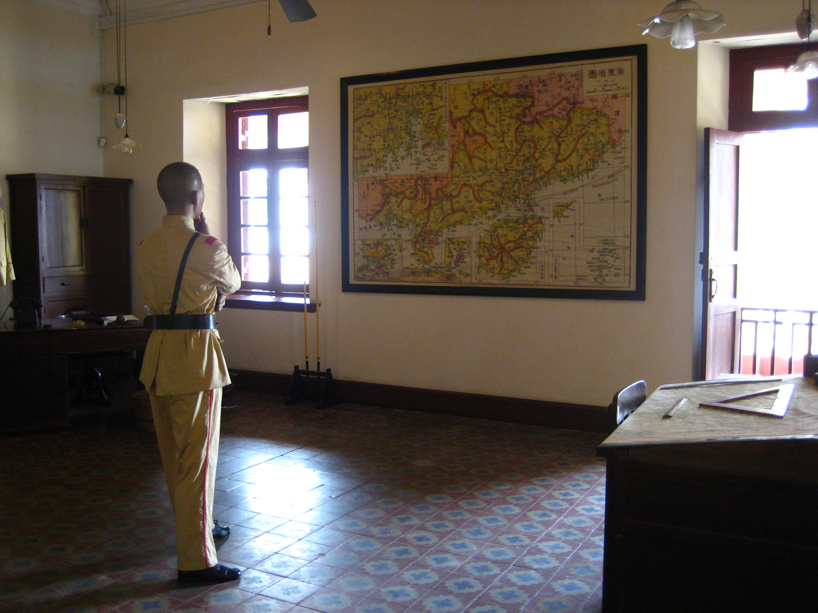 廣州孫中山大元帥府紀念館中蔣介石辦公室